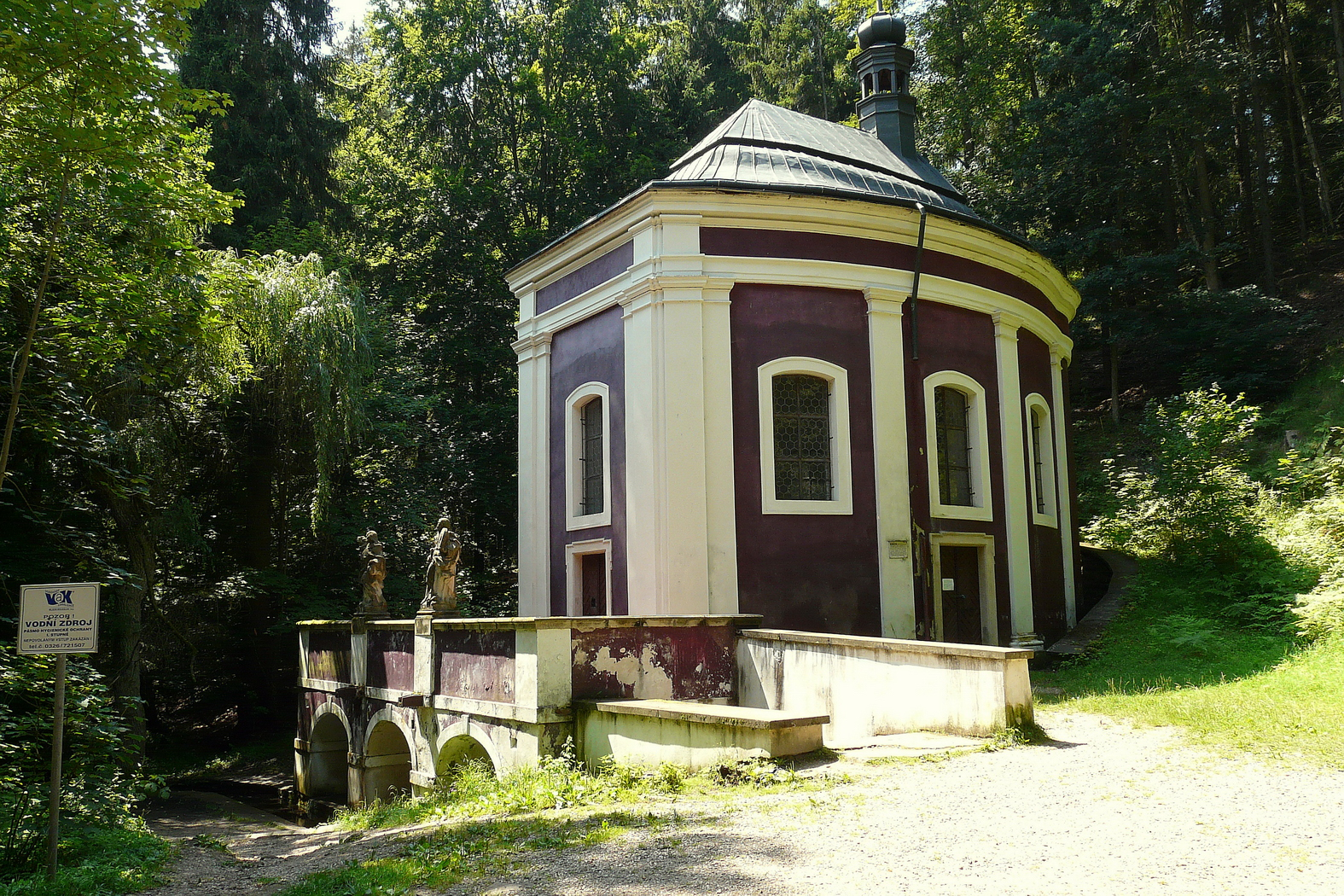 Kaple sv. Stapina, Klokočka